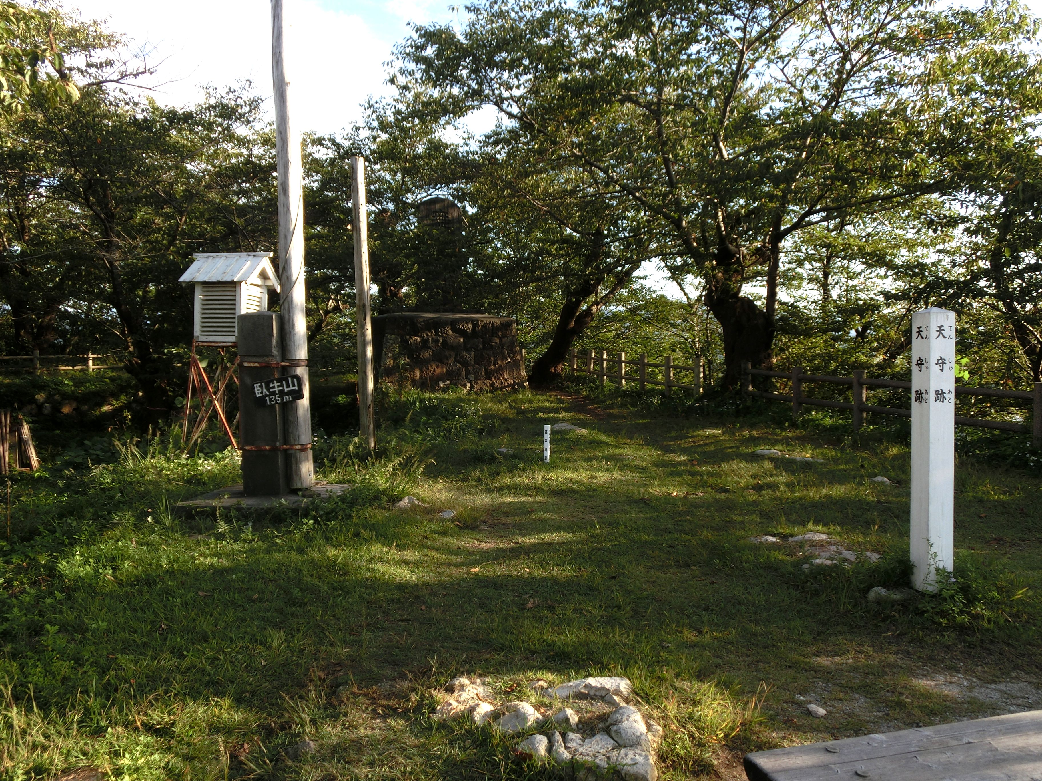 臥牛山山頂（村上城天守跡）